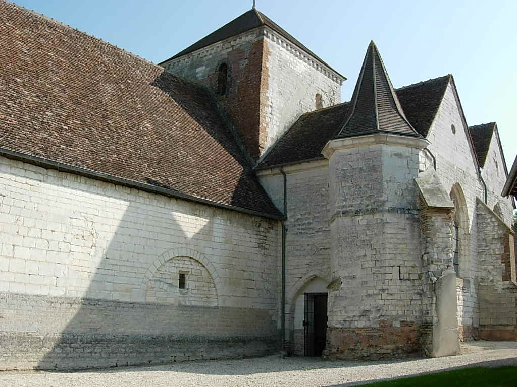 Eglise de Premierfait